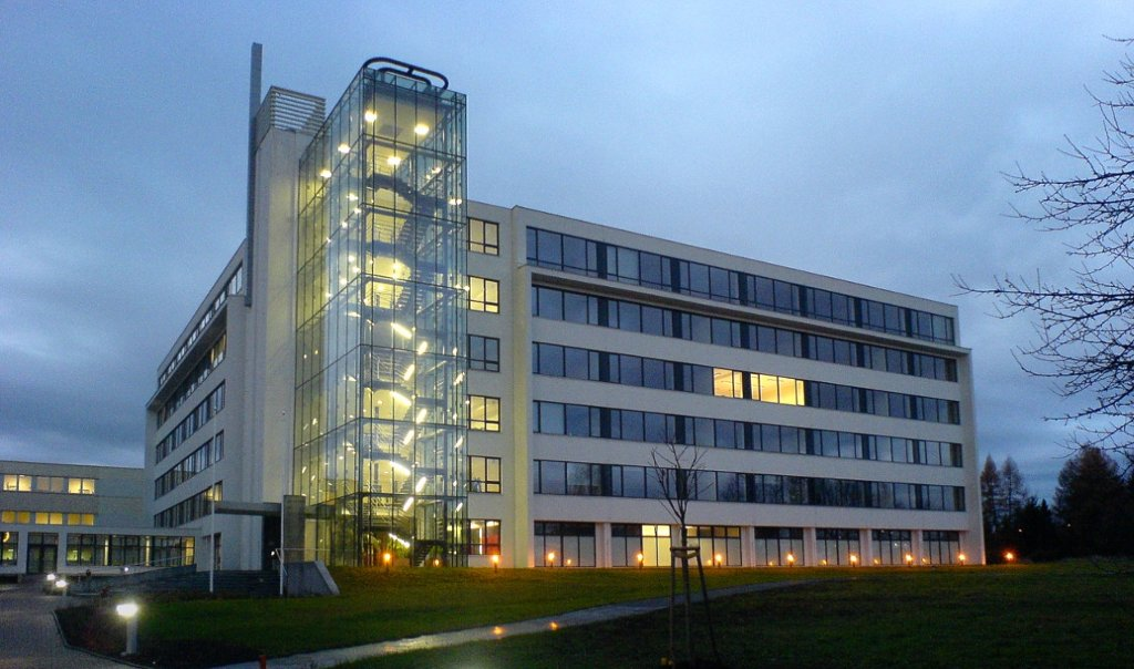 Tzv. „pavilon velkých poslucháren“ (H, I) Fakulty stavební Vysoké školy báňské – Technické univerzity Ostrava krátce po dokončení (listopad 2009).